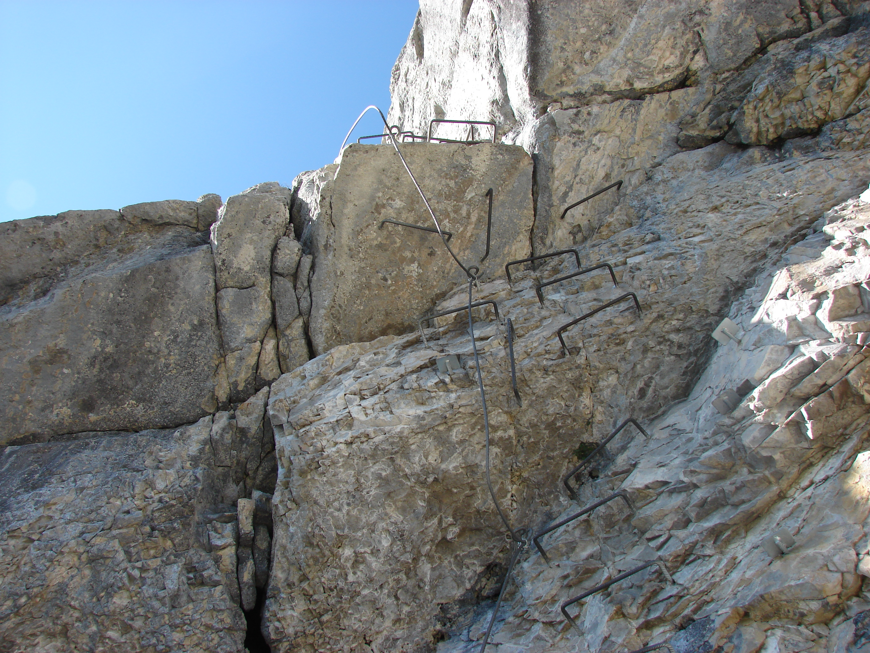 Via Ferrata route near La Clusaz